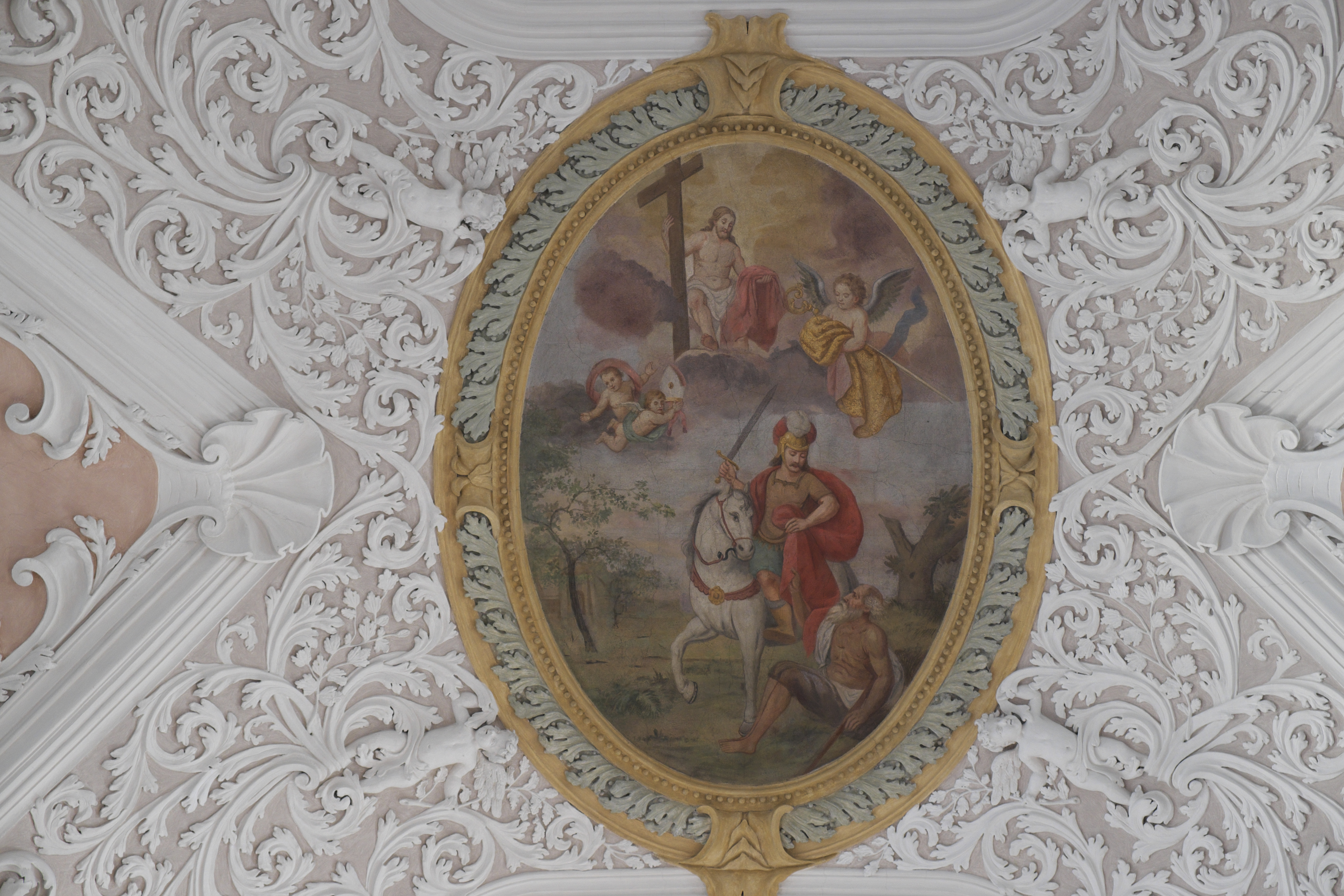 Katholische Pfarrkirche St. Martin in Waging am See im Landkreis Traunstein (Bayern/Deutschland), Stuck im Langhaus von Joseph Schmidt, von 1699; Fresko mit Darstellung der Mantelteilung des heiligen Martin